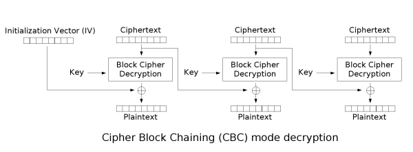 Descifrado modo CBC